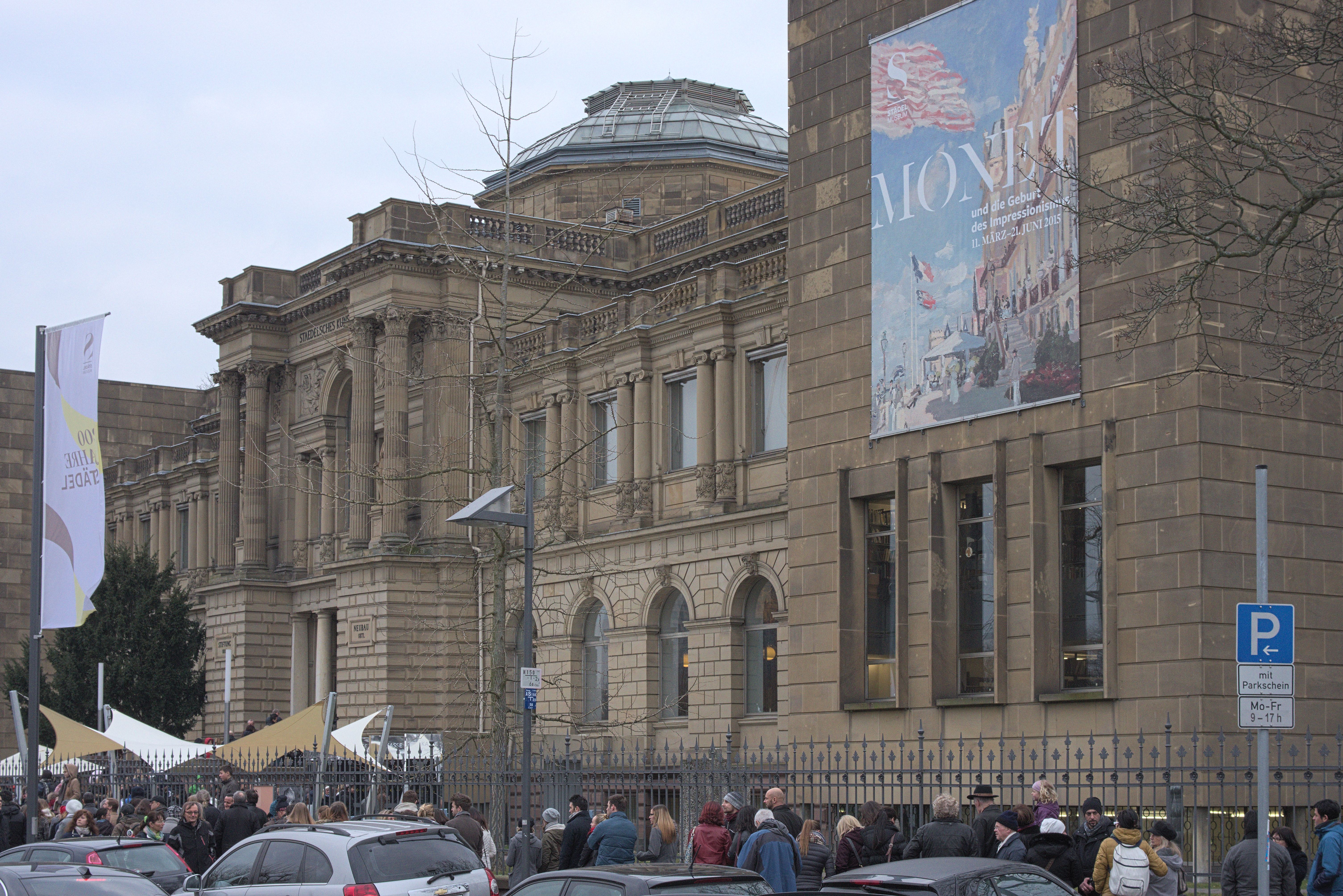 Frankfurt am Main, Städelsches Kunstinstitut. Bürgerfest 15. März 2015.